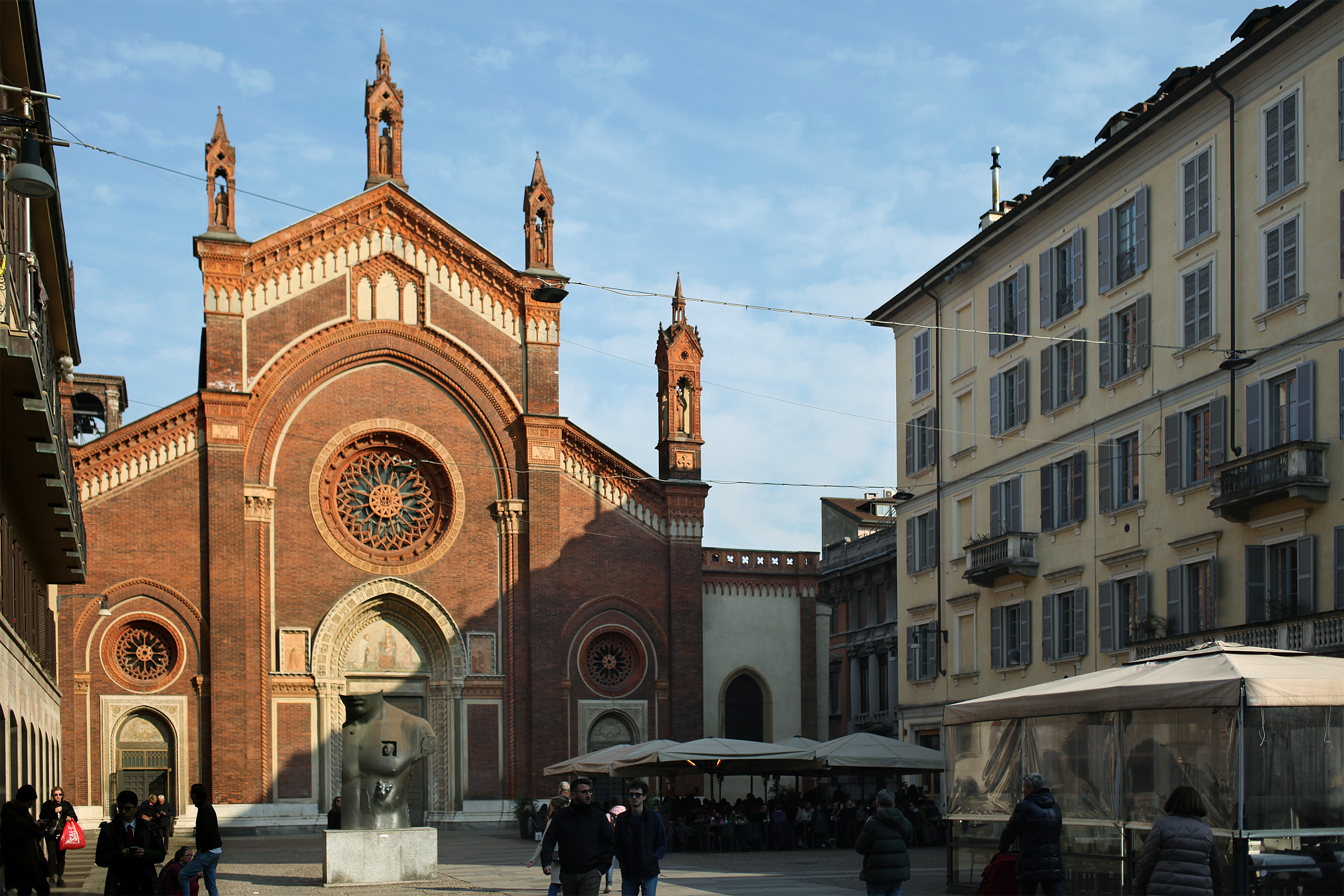 Chiesa di Santa Maria del Carmine, Milano, veduta di tre quarti